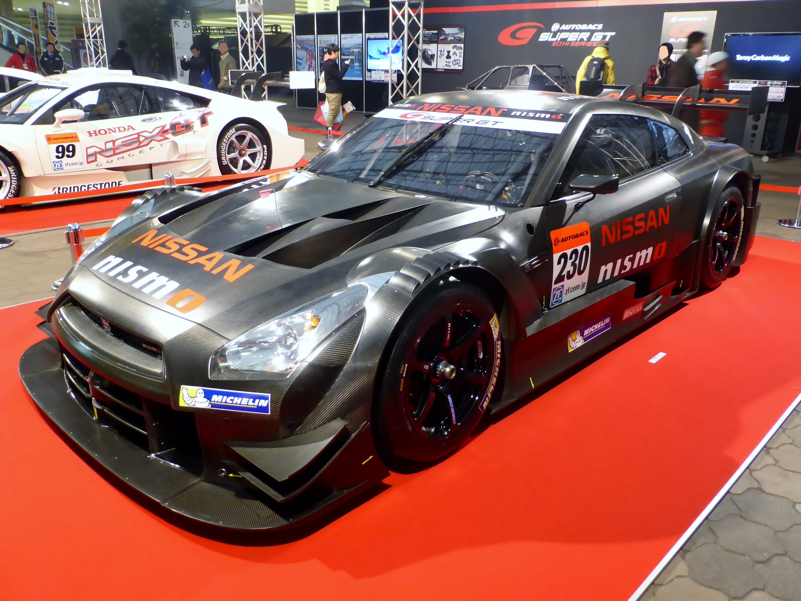 大阪オートメッセ2014に展示された日産・GT-RニスモGT500を撮影。